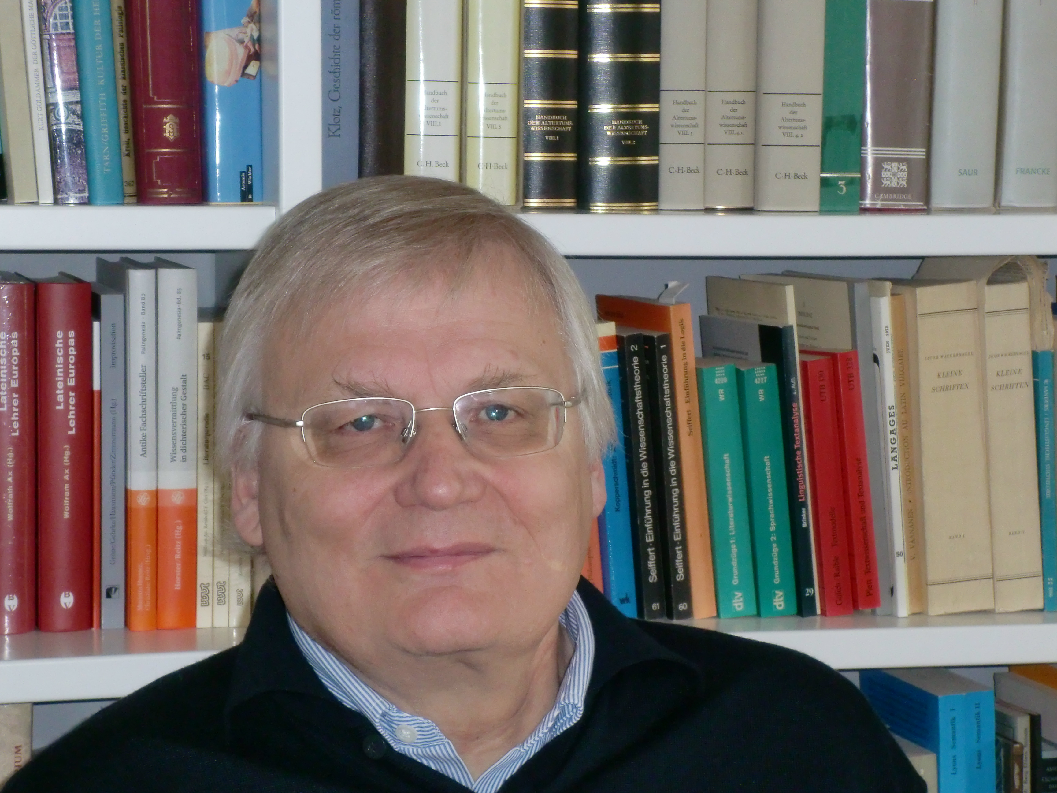 Wolfram Ax, Professor für Klassische Philologie in Köln